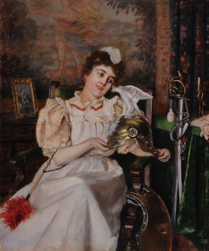 Die Uniform des Helden. Signiert "Paul Spangenberg" und datiert.